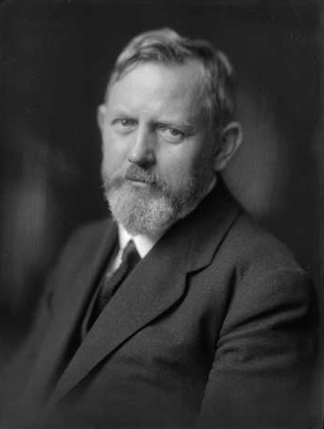 Emil Votoček, chemik a rektor ČVUT